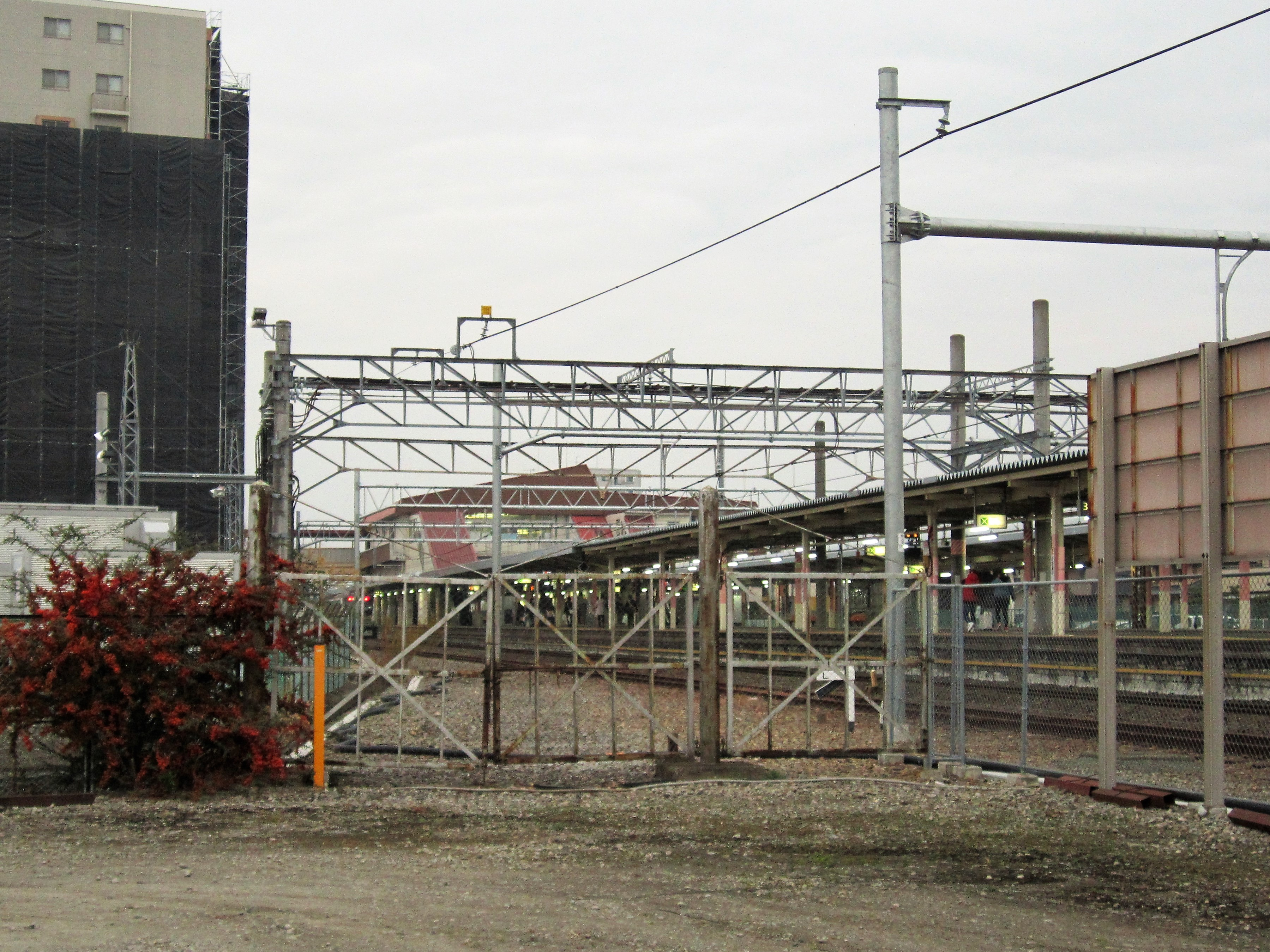 吹上駅から関東菱油吹上油槽所に延びていた専用線跡 Canon PowerShot A2200